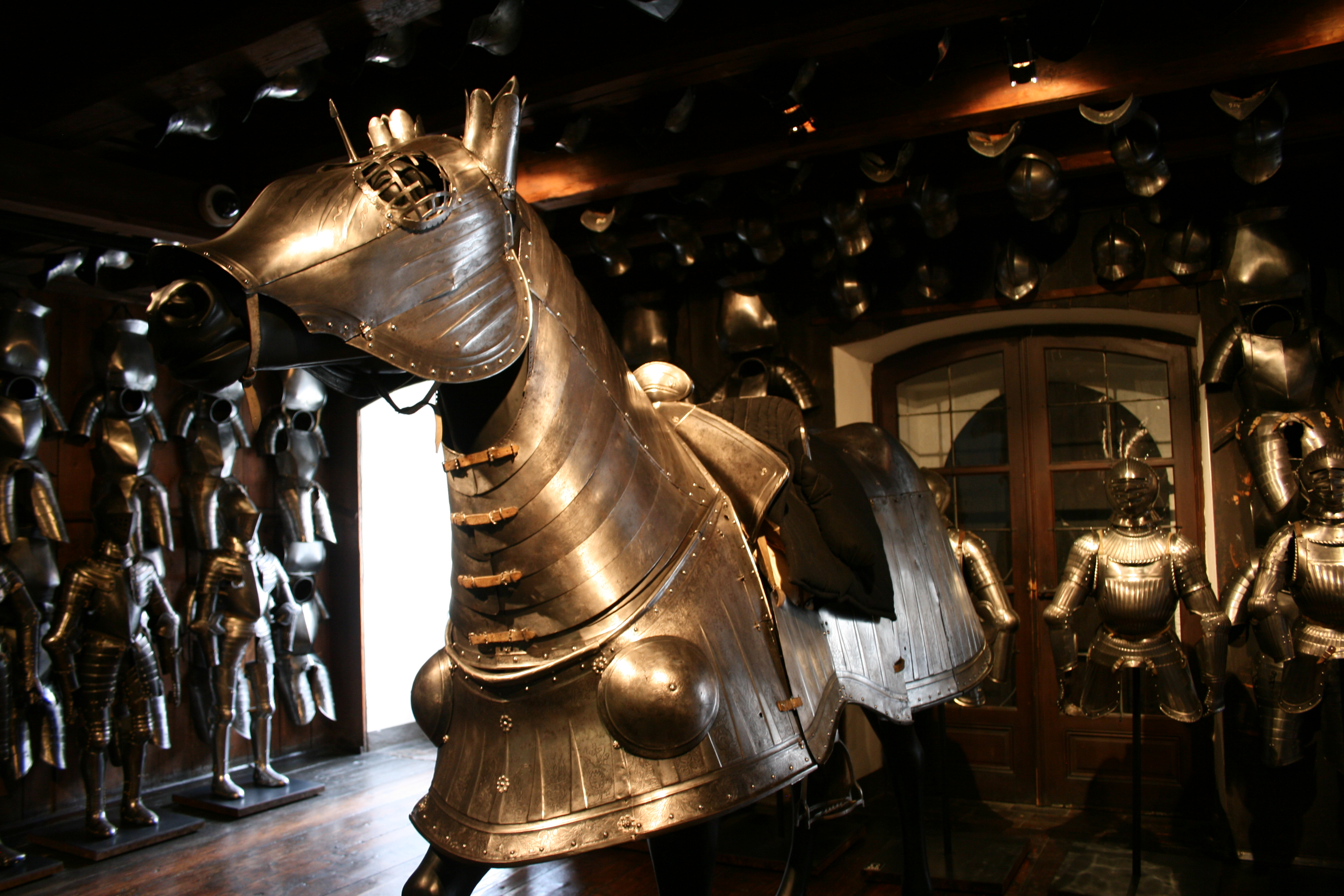 Pferdeharnisch im Zeughaus Graz.